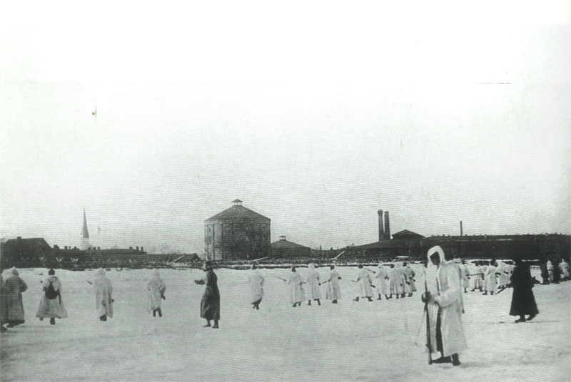 Сотрудники следственно-розыскной милиции Петрограда участвуют в штурме Кронштадта.